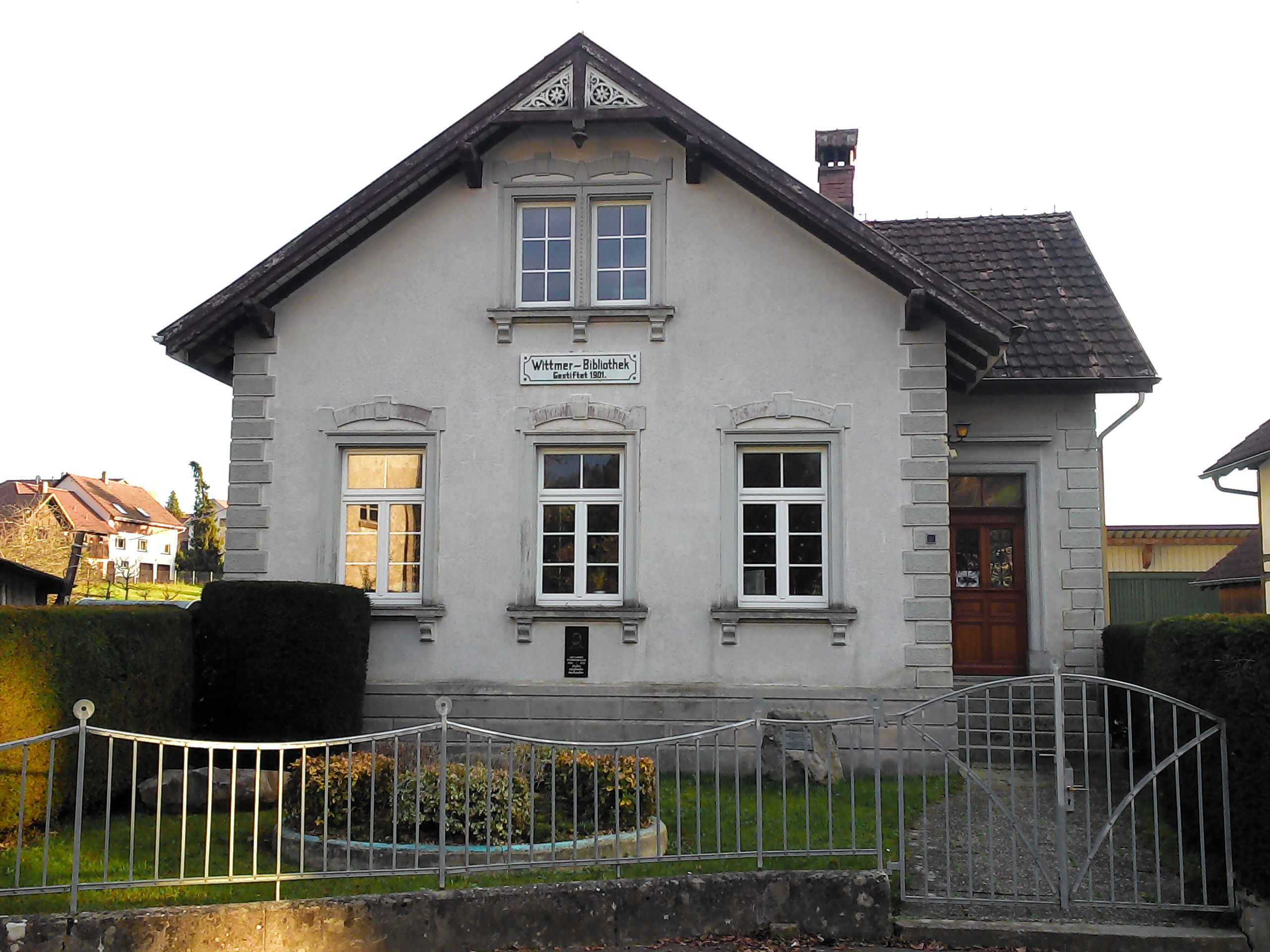 Wittmer-Bibliothek in Dettighofen im Landkreis Waldshut, Baden-Württemberg, Deutschland, 2015.